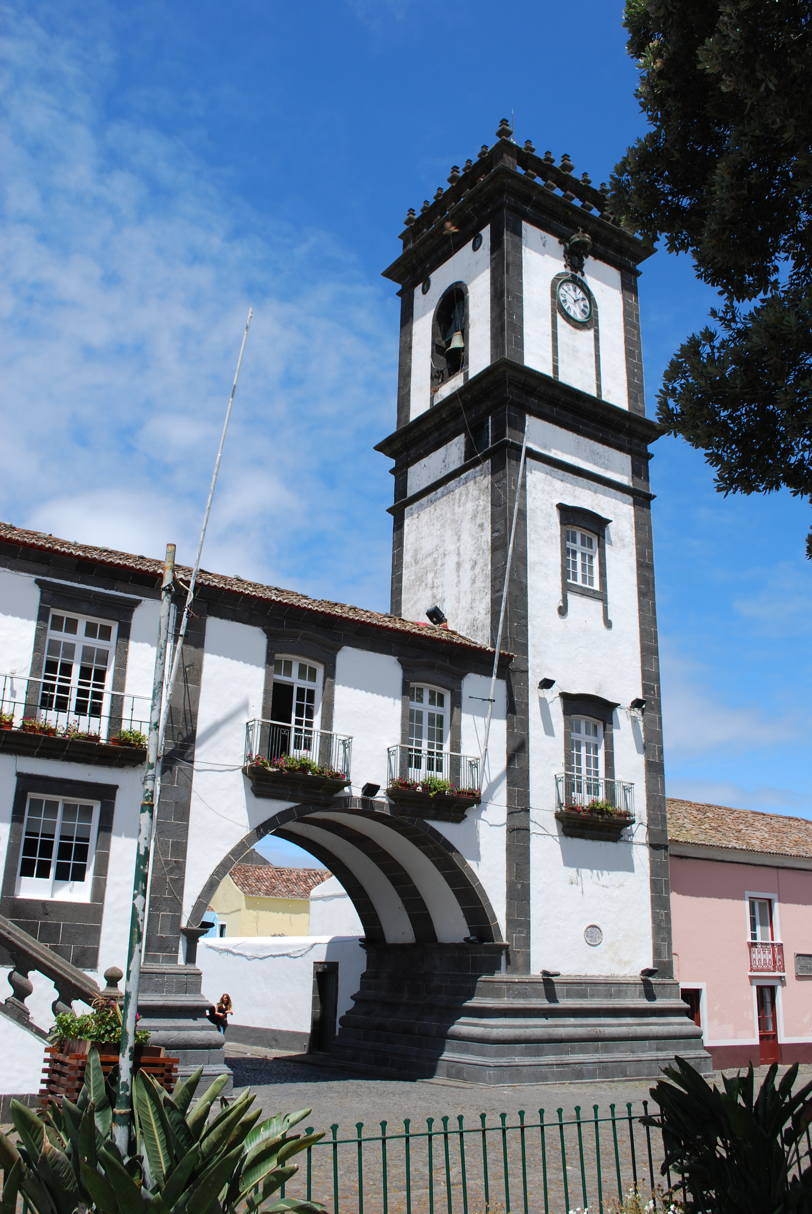 Paços do Concelho da Ribeira Grande